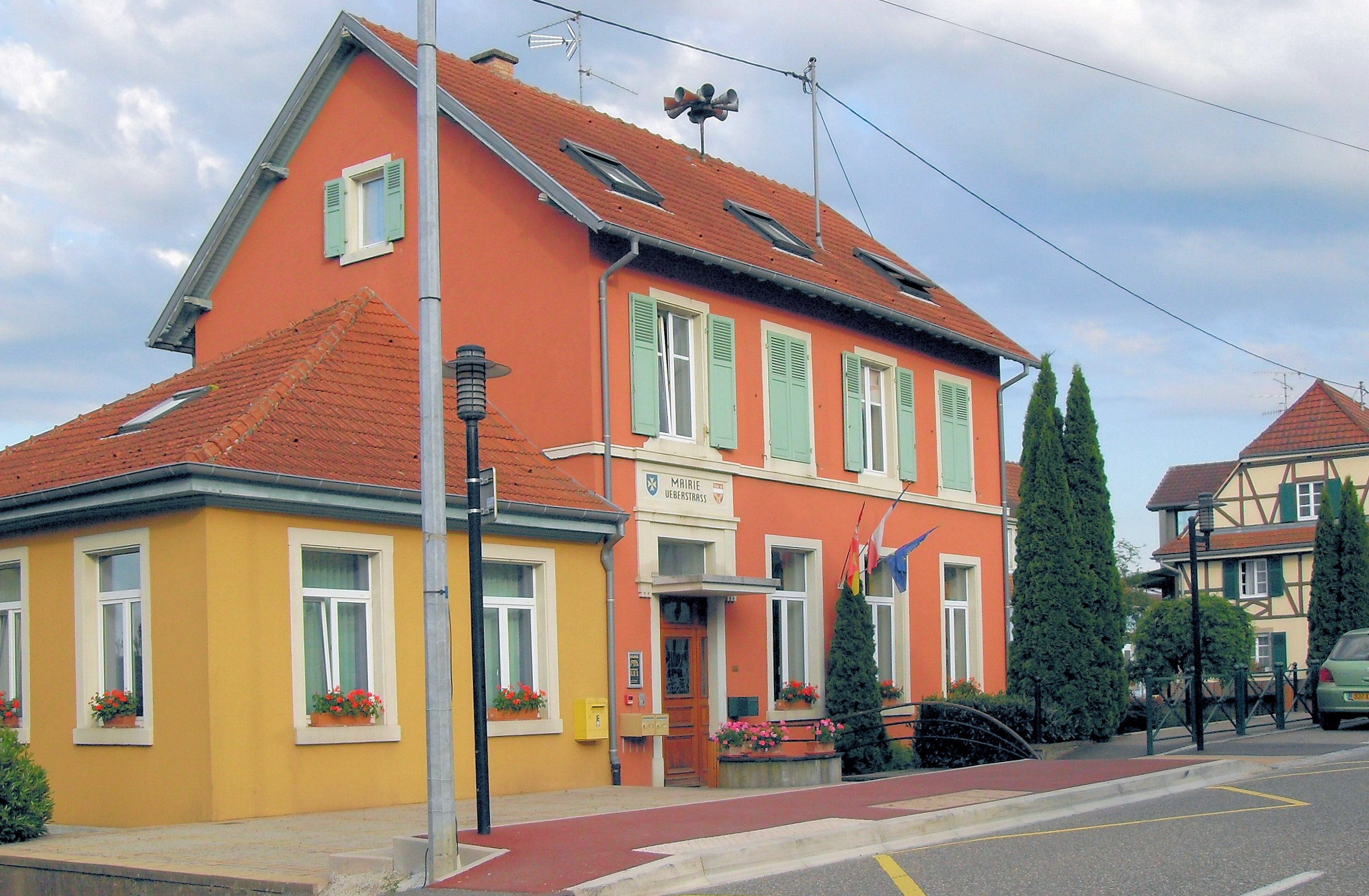 La mairie d'Ueberstrass